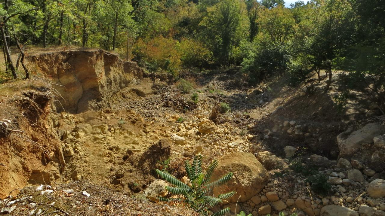 Эрозионно-оползневые оползневые процессы в долине Хаста-Баш